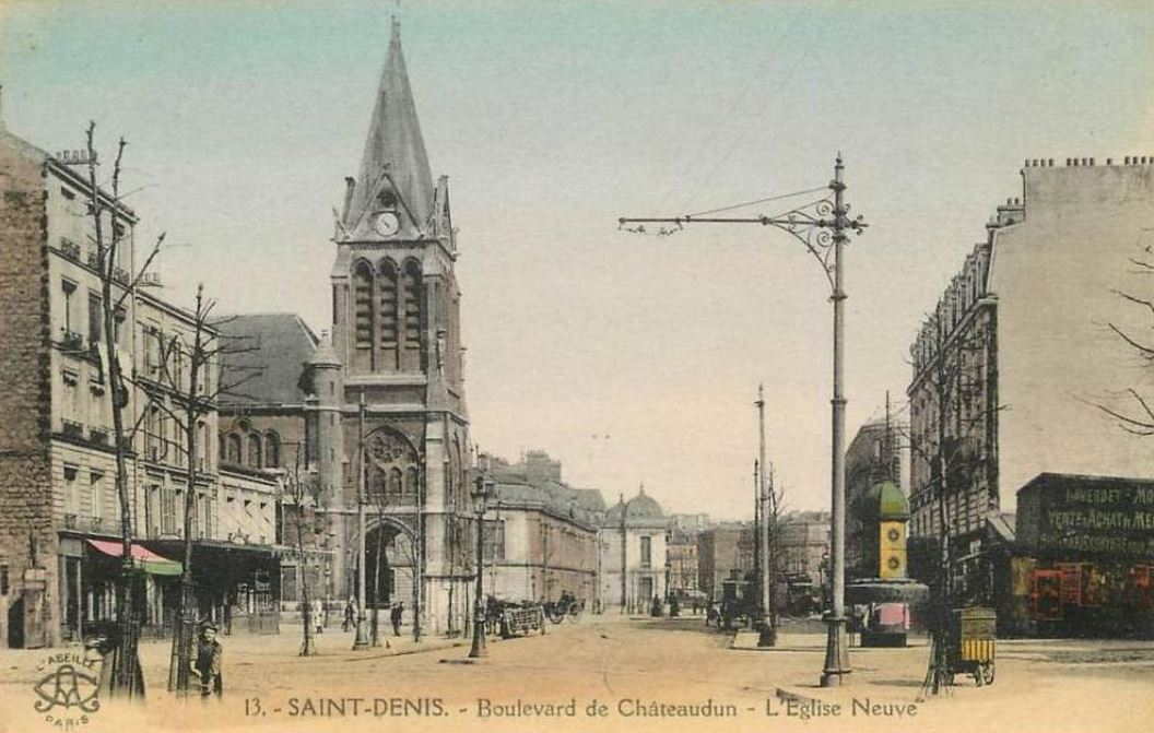 Boulevard de Chateaudun à Saint-Denis